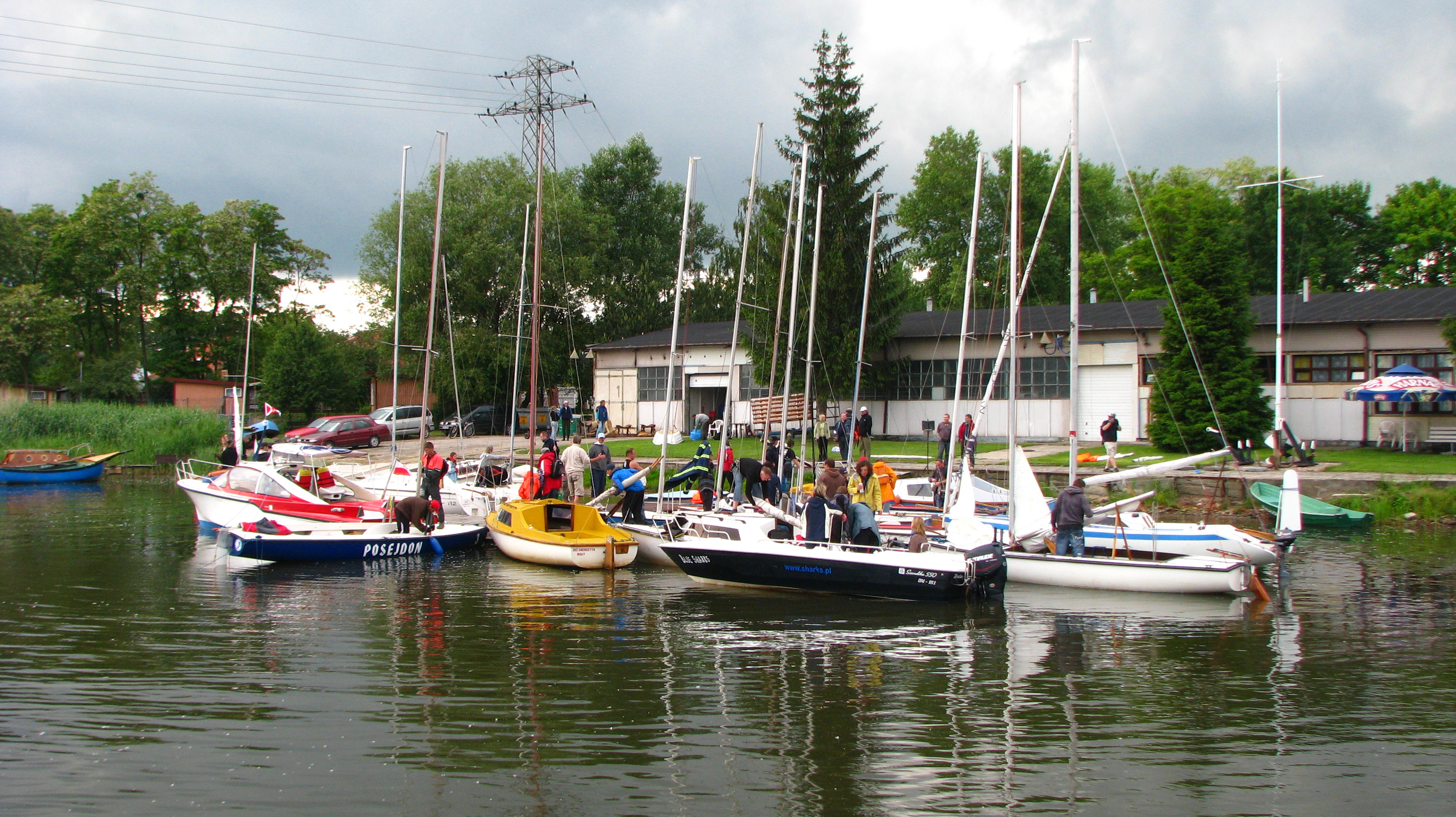 Związkowy Klub Żeglarski "Energetyk". Przystań we wsi Wały.